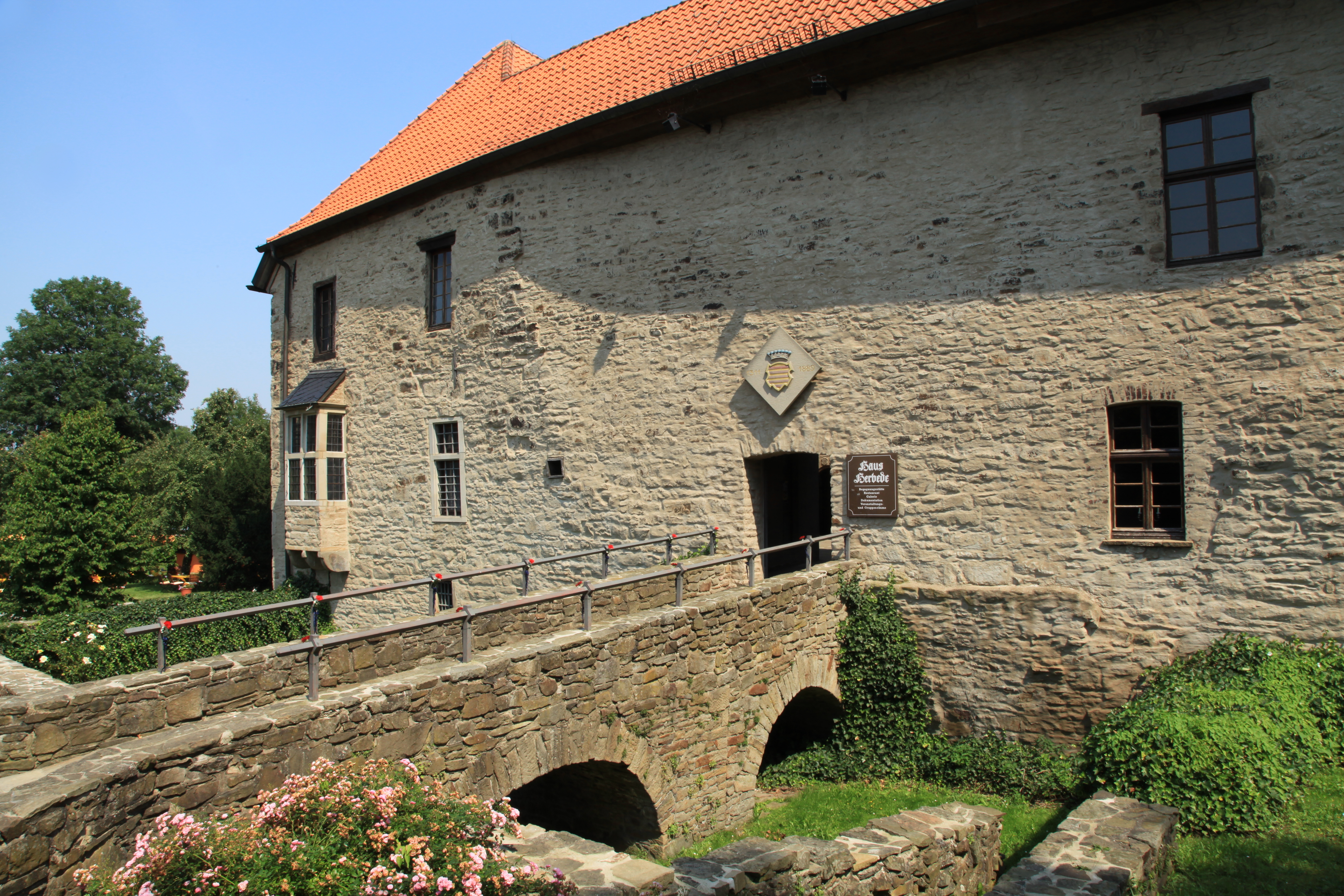 Haus Herbede, Von-Elverfeldt-Allee in Witten-Herbede